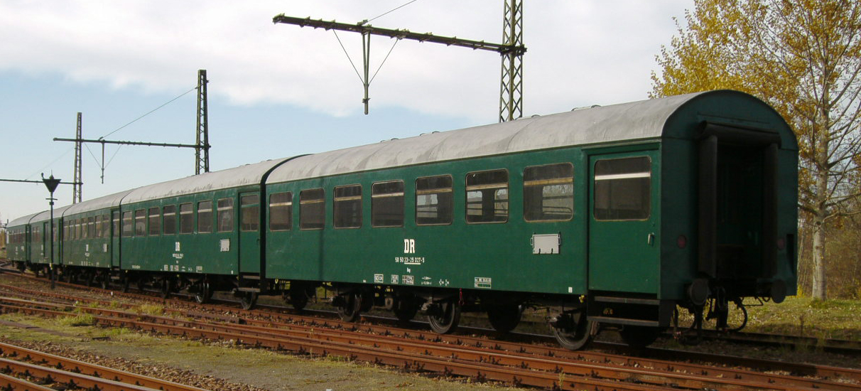 Garnitur aus mehreren dreiachsigen Reko-Wagen